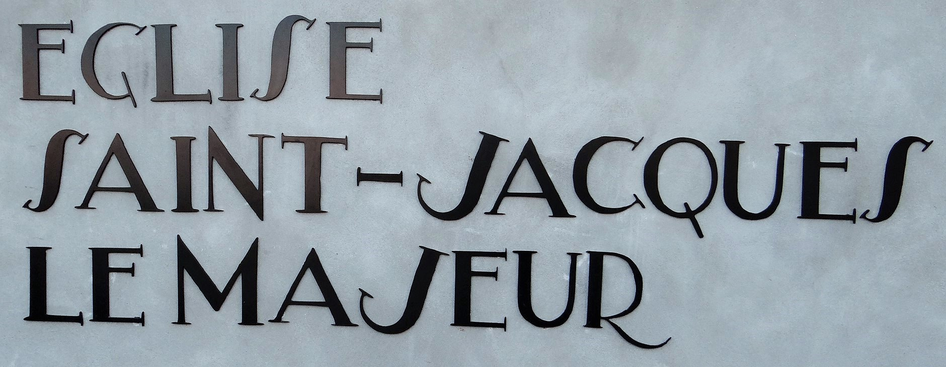 Inscription sur le parvis de l'église Saint-Jacques le Majeur à Montrouge, réalisée en 2016 avec le même style de caractères que les inscriptions dans l'église